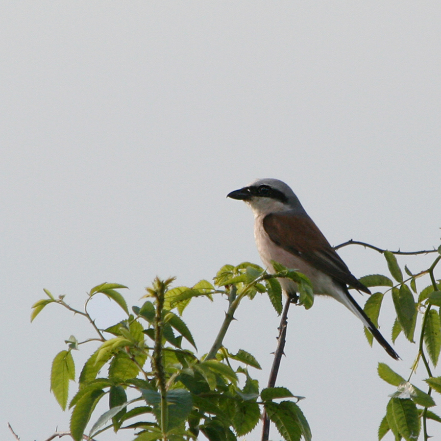 Neuntöter (Lanius collurio), Altvogel, Rieps, Nordwestmecklenburg